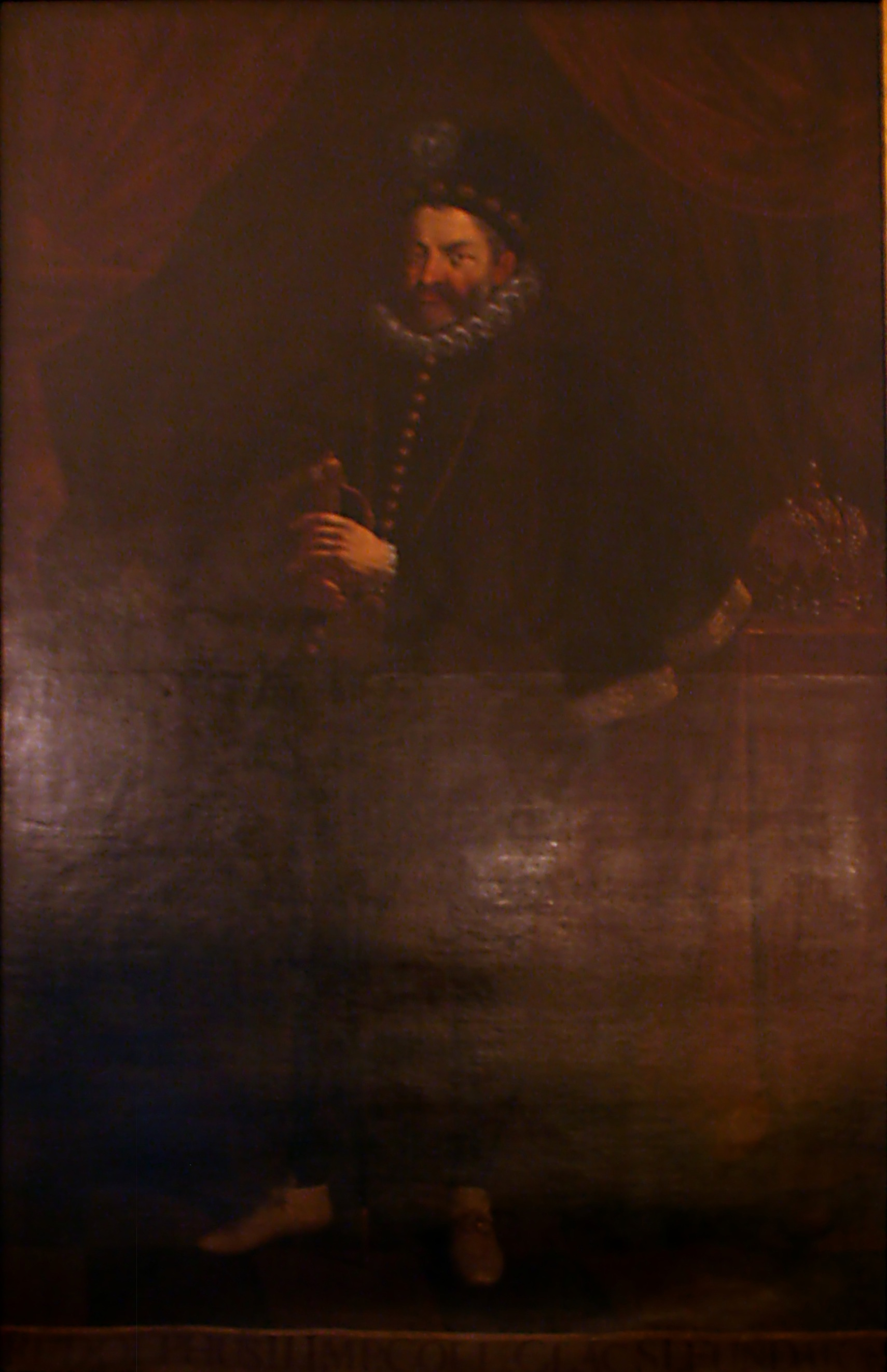 Muzeum Ziemi Kłodzkiej w Kłodzku. Portret Rudolfa Habsburga II I poł. XVII w.